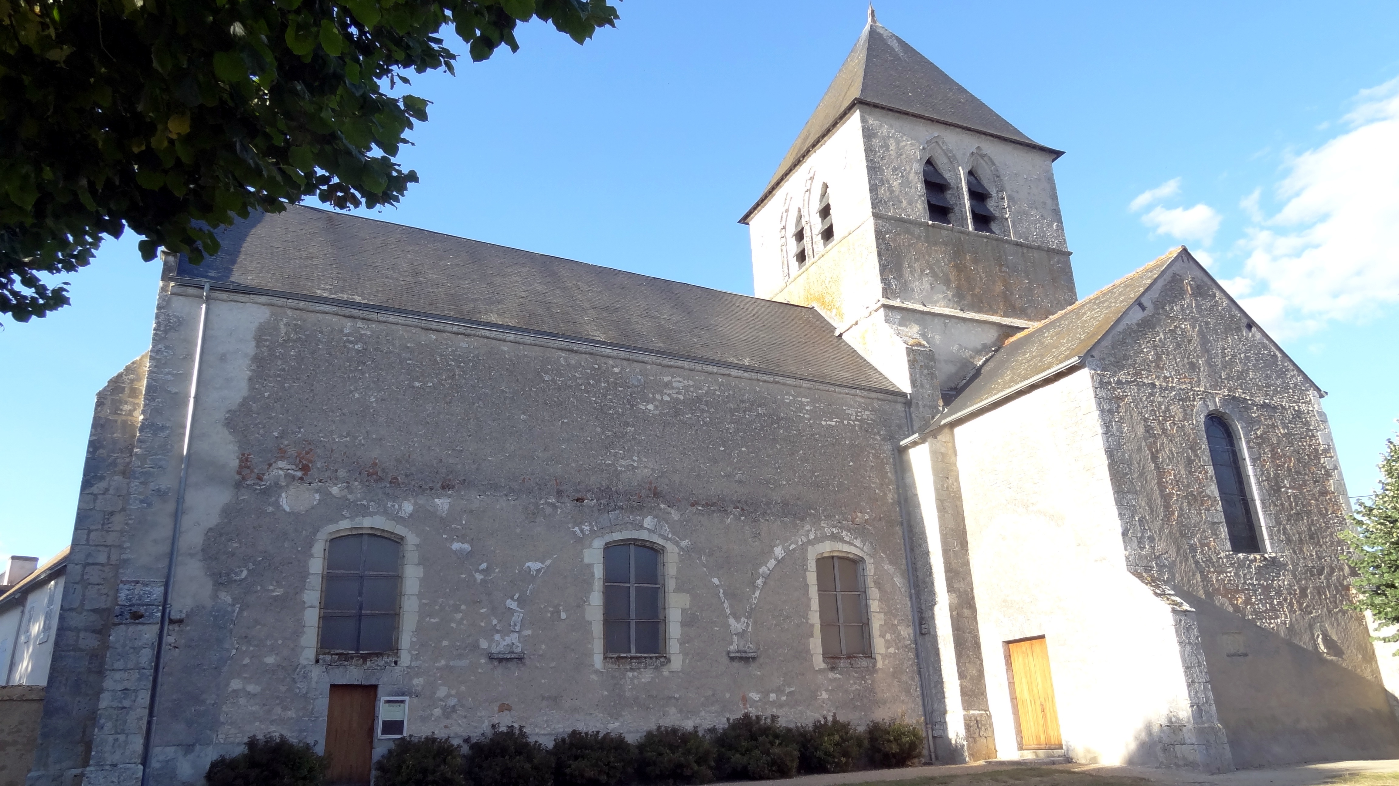 Église Saint-Bohaire de Saint-Bohaire, Loir-et-Cher, France. .